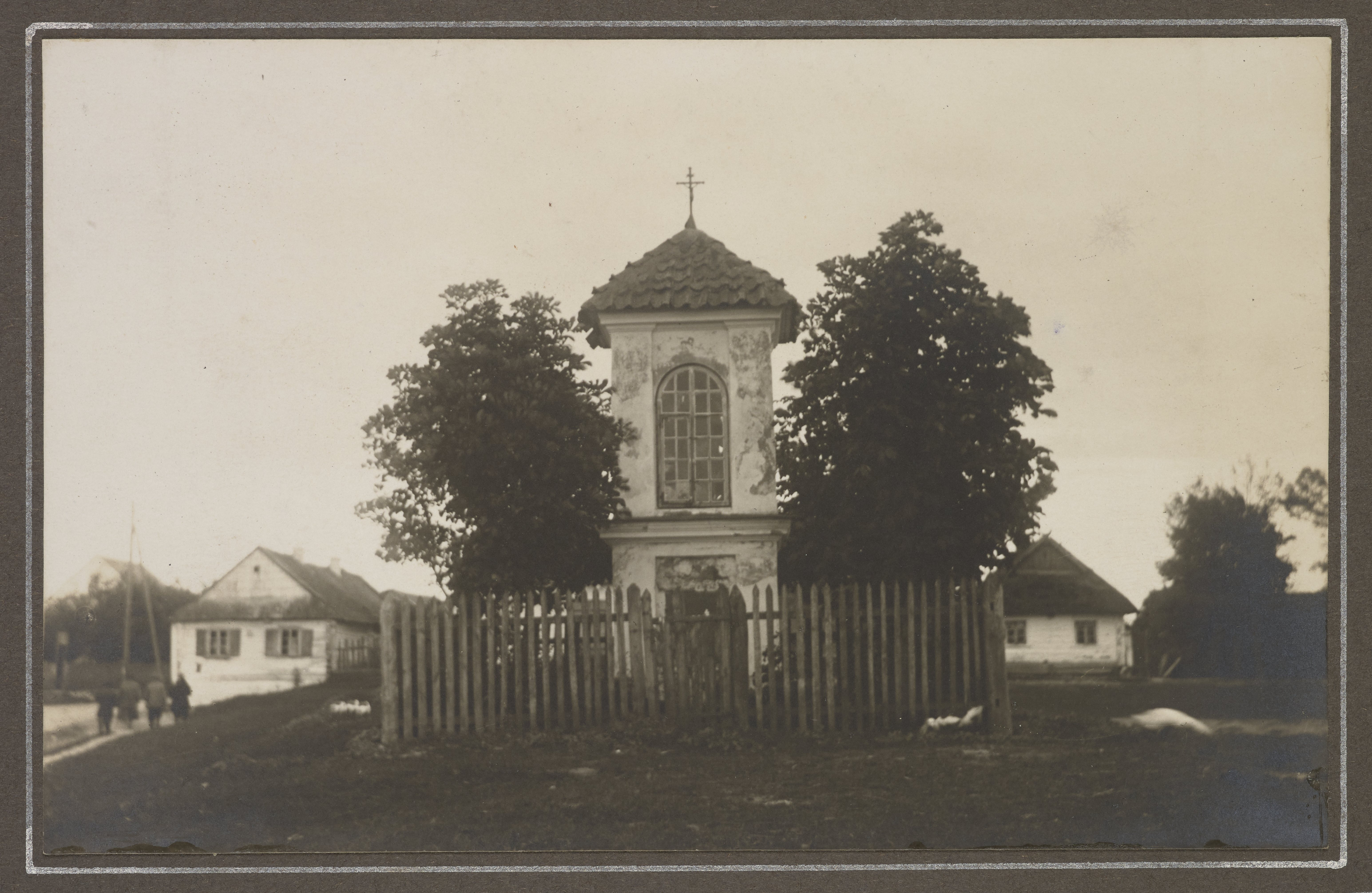 Беларуская (тарашкевіца): Нясьвіж (Niaśviž), вуліца Слуцкая (vulica Słuckaja). Капліца Сьвятога Вінцэнта